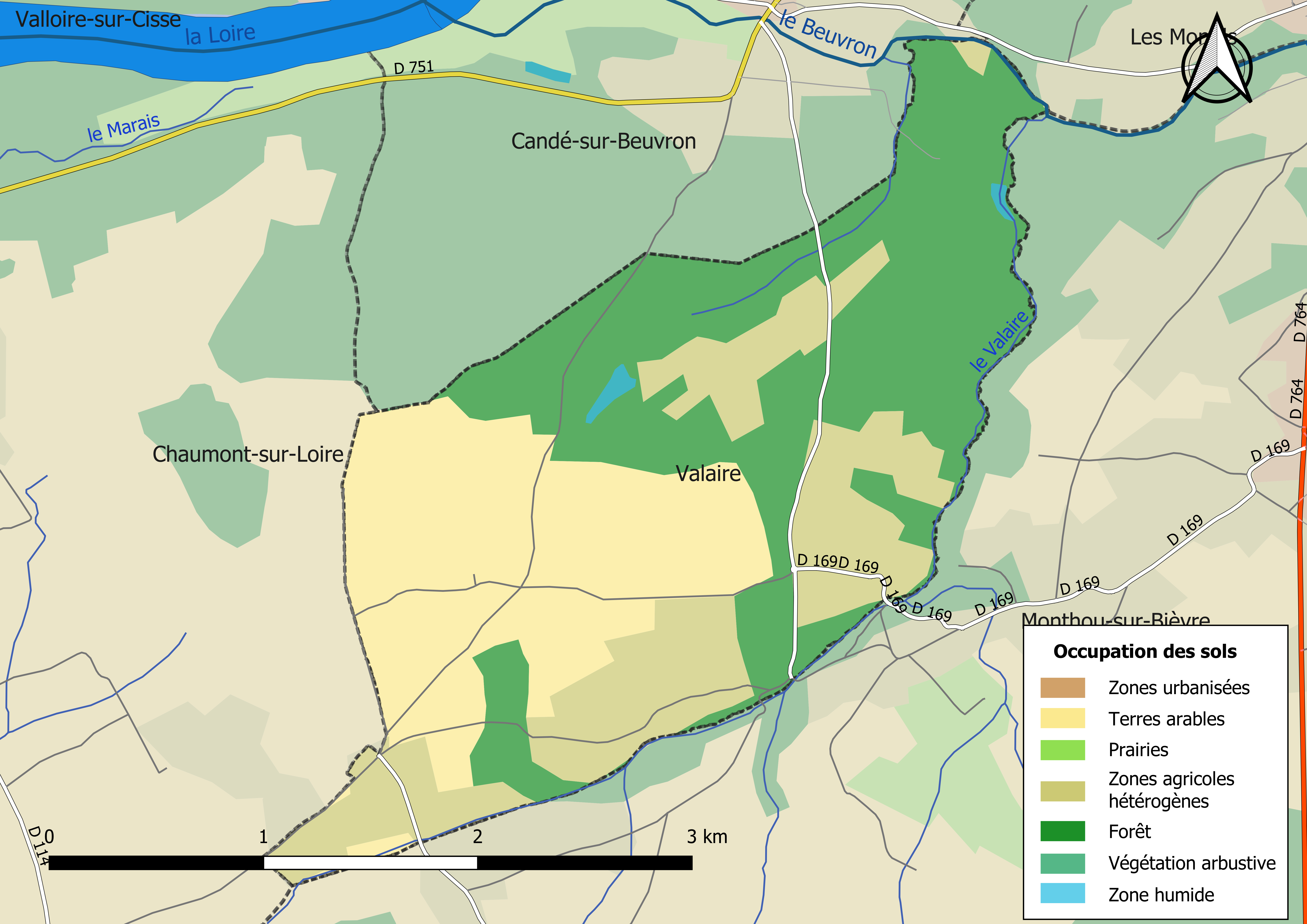 Carte des infrastructures et de l’occupation des sols en 2018 de la commune de Valaire (France).